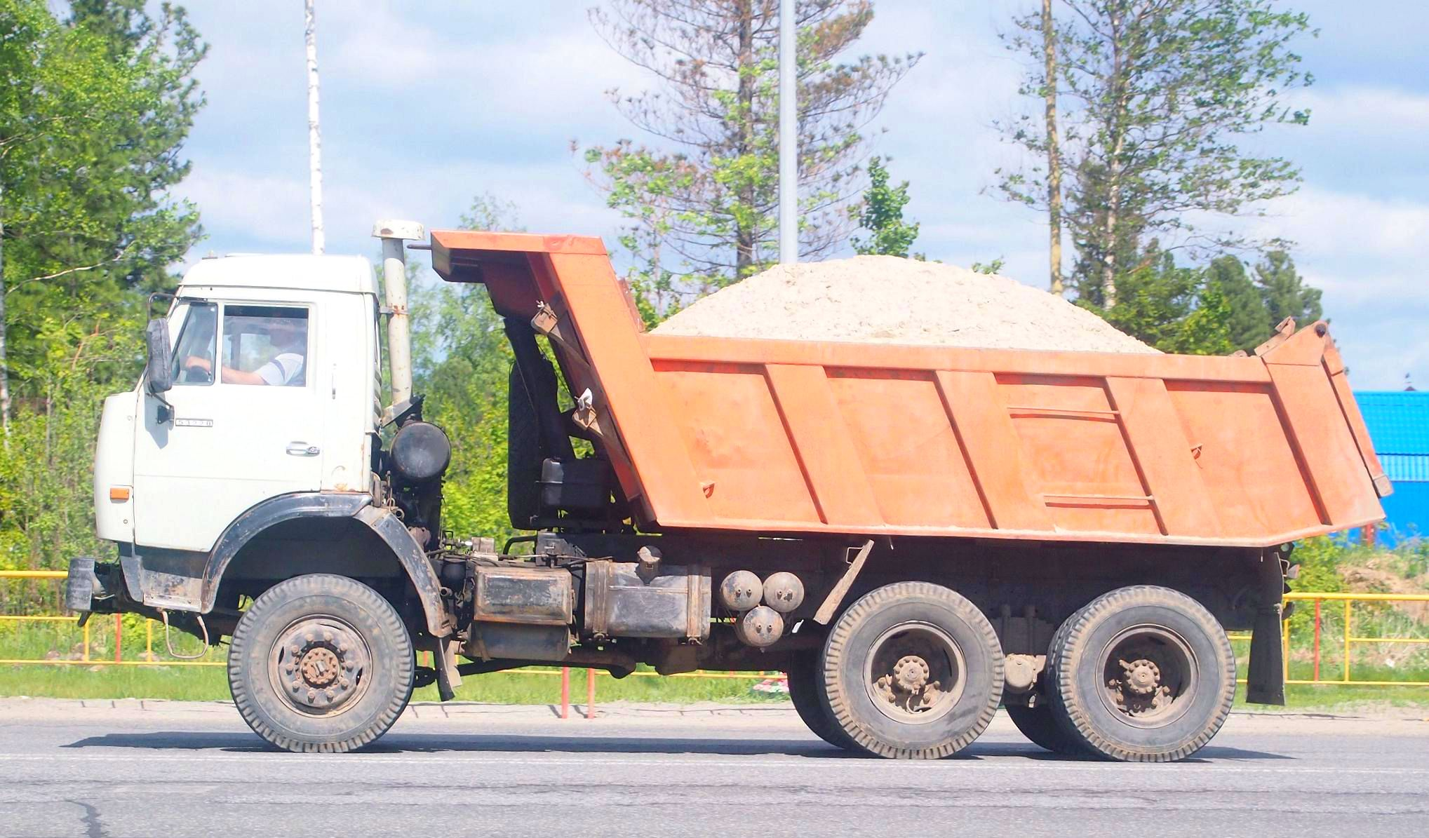 КАМАЗ-65111, Ханты-Мансийск